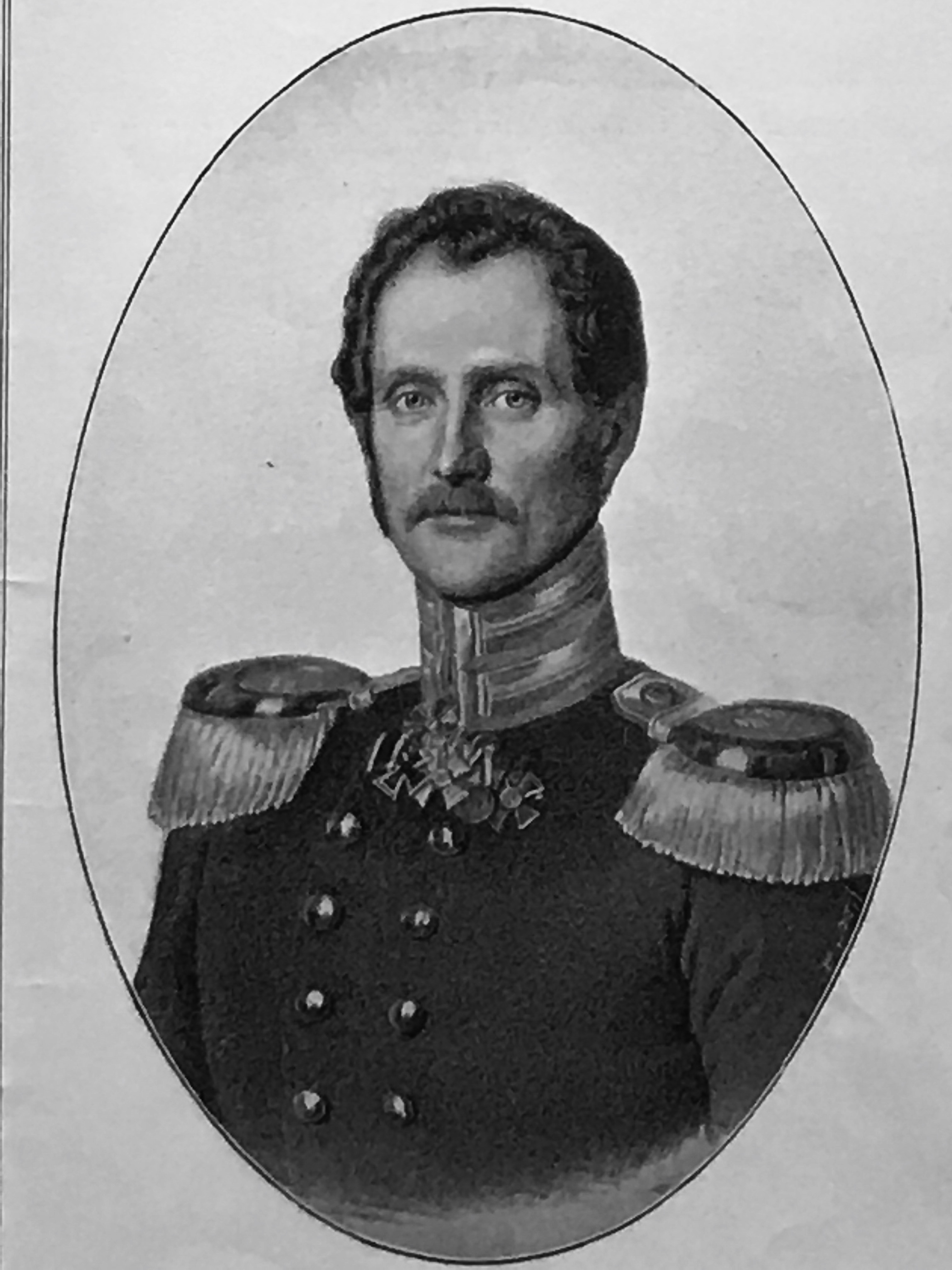 Generalmajor Leopold von Rauch,, Schwager Ulrike von Levetzows Quelle: Adolf Kirschner, Erinnerungen an Goethes Ulrike und an die Familie von Levetzow-Rauch, 1904